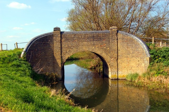 Bridge over Soham Lode